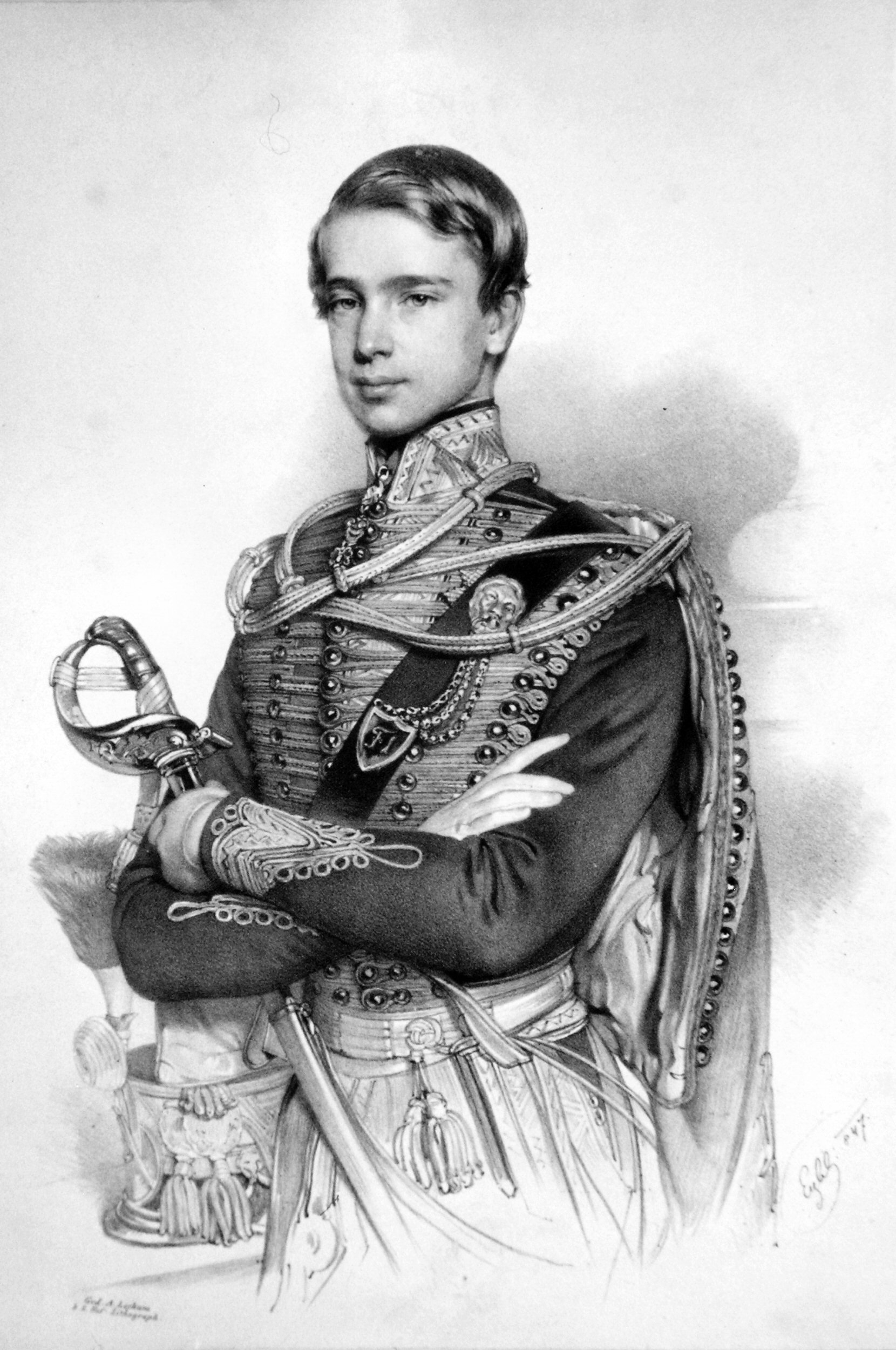 Franz Joseph I. (1830-1906), Kaiser von Österreich, König von Ungarn etc. etc. Lithographie von Franz Eybl, 1847